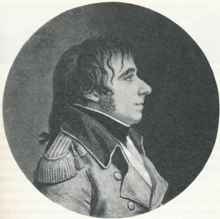 Ulrik Christian von Schmidten (1761-1828), Danish nobleman and estate owner